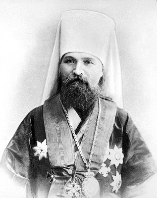 Владимир (Богоявленский), митр. Московский. Фотография. Нач. 10-х гг. XX в.